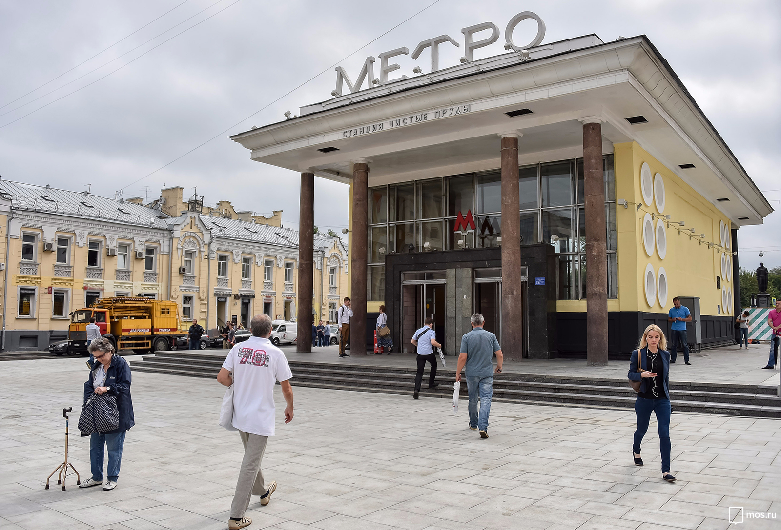 Вестибюль станции метро Чистые пруды (август 2016 года).